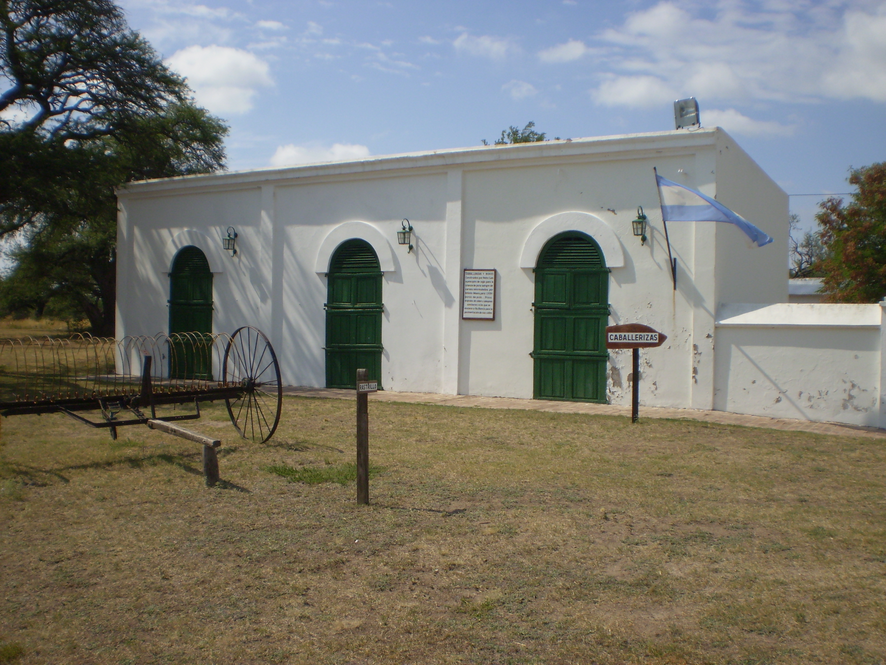 (Caballerizas) Reserva natural "Parque Luro", La Pampa, Argentina